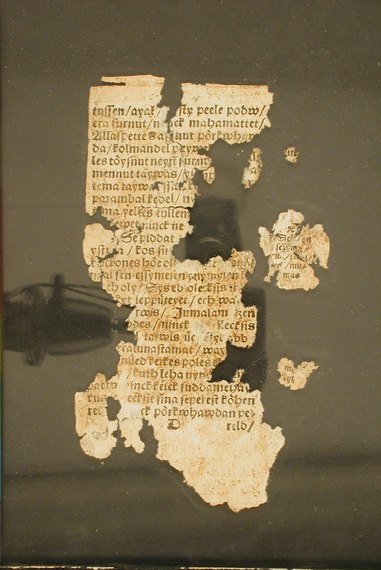 Wanradti-Koelli katekismus, fragment